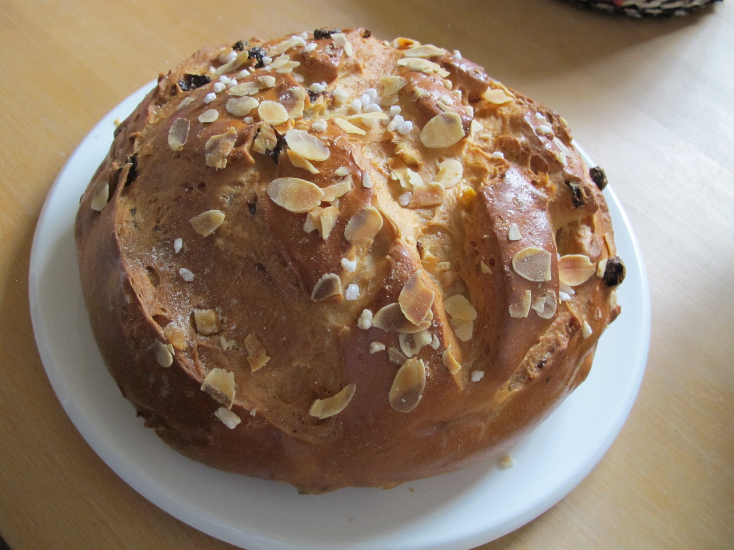 Osterfladen